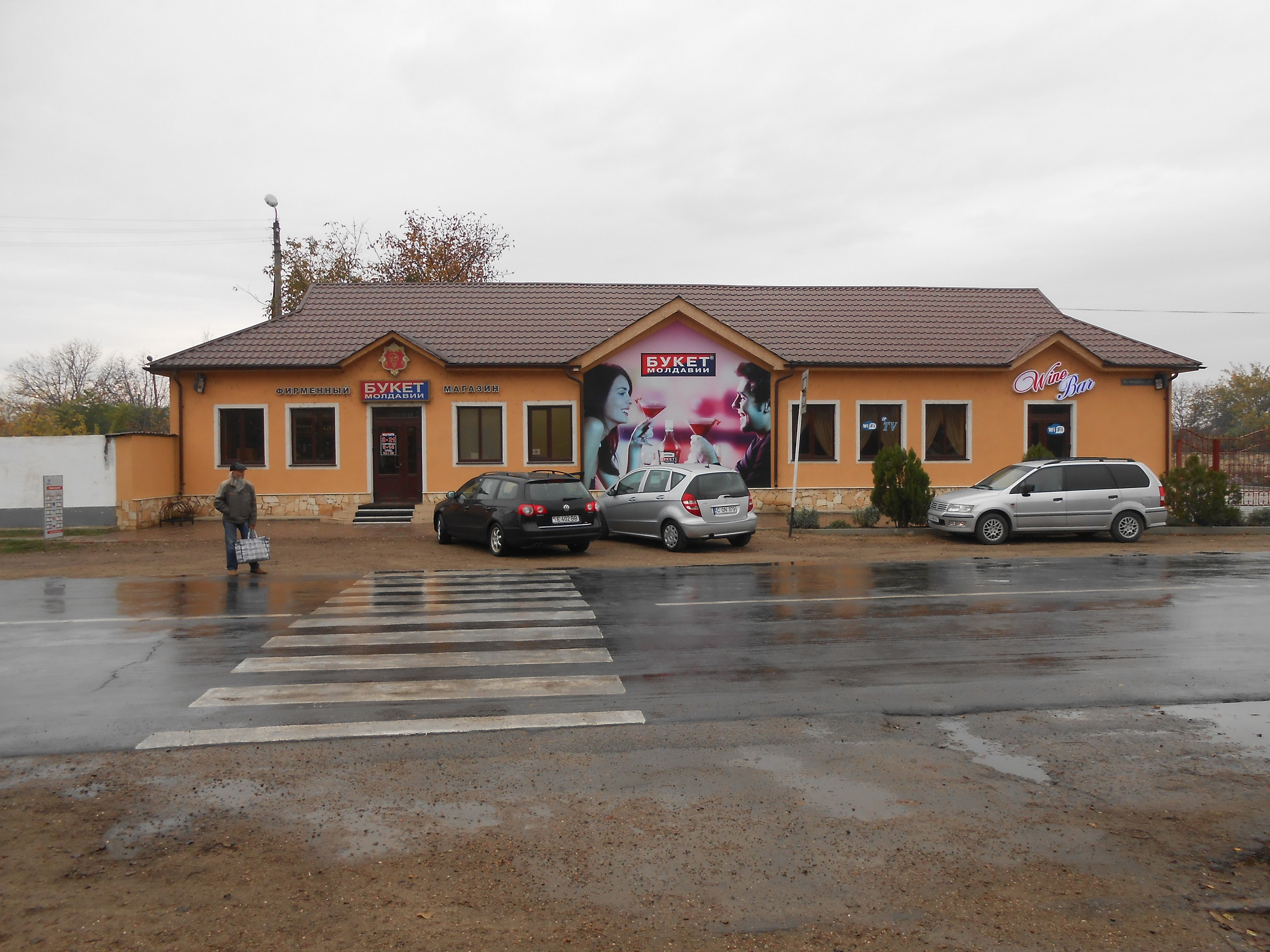 Магазин Букет Молдавии в Дубоссарах Taken with Nikon Coolpix S2700